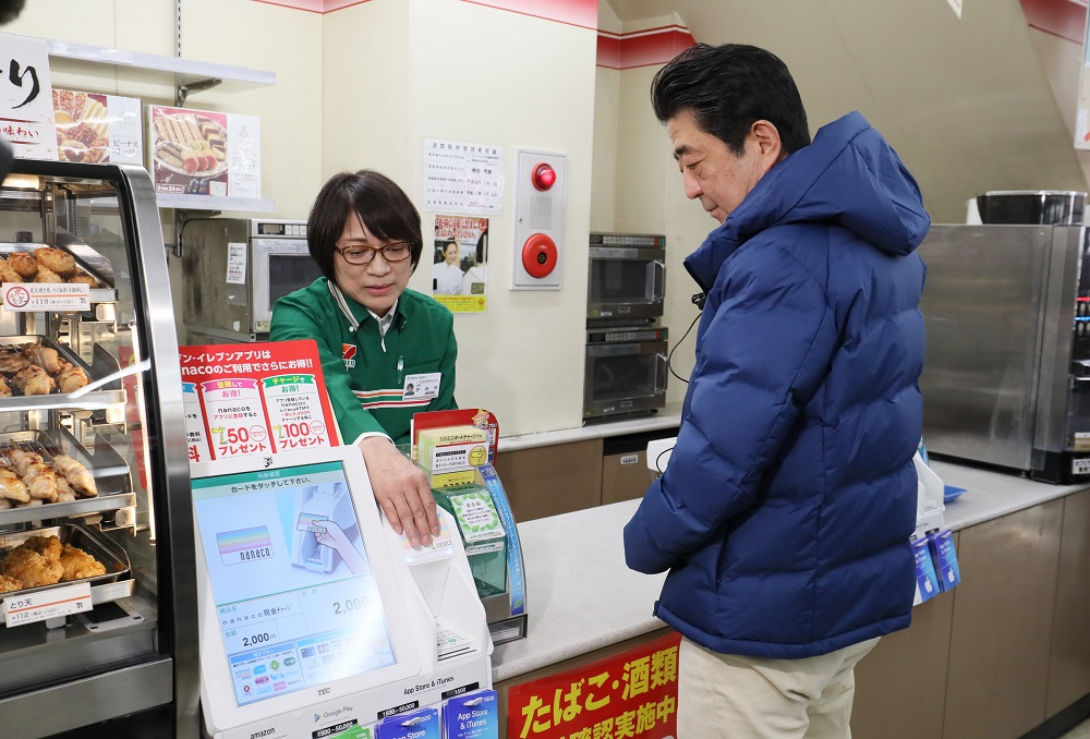 戸越銀座商店街視察 03